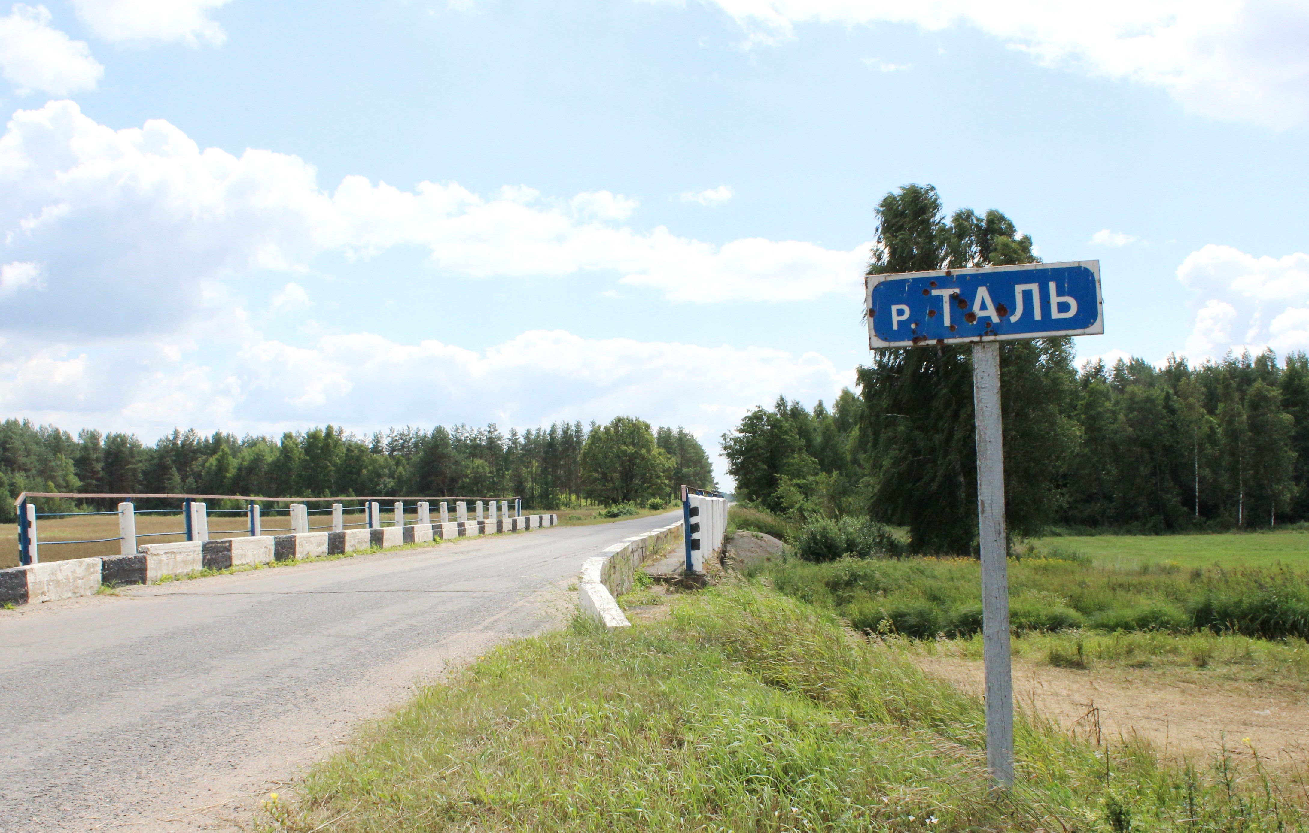 Автомобильный мост через реку Таль